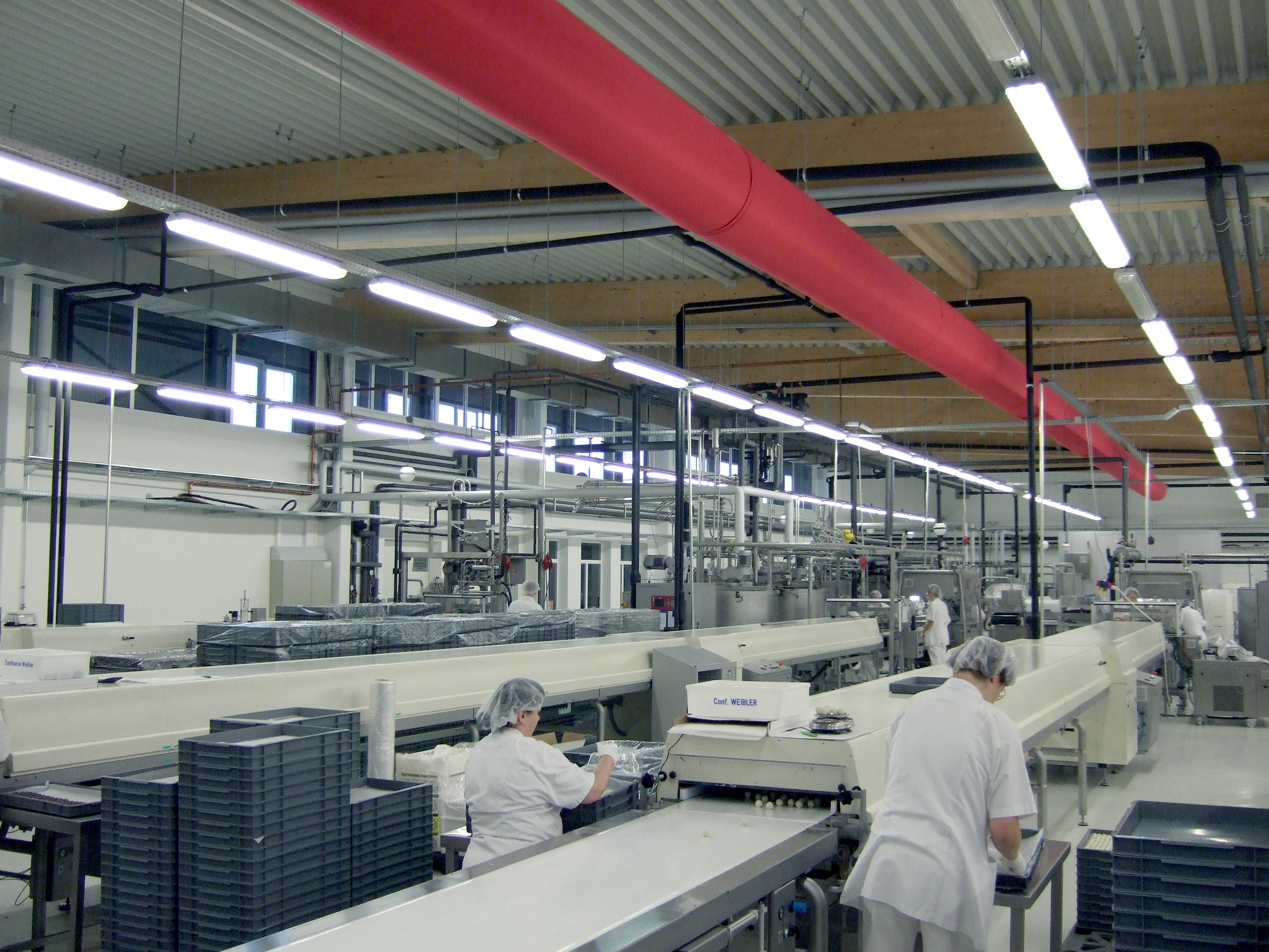 Das Innere der Halloren Schokoladenfabrik in Halle (Saale).